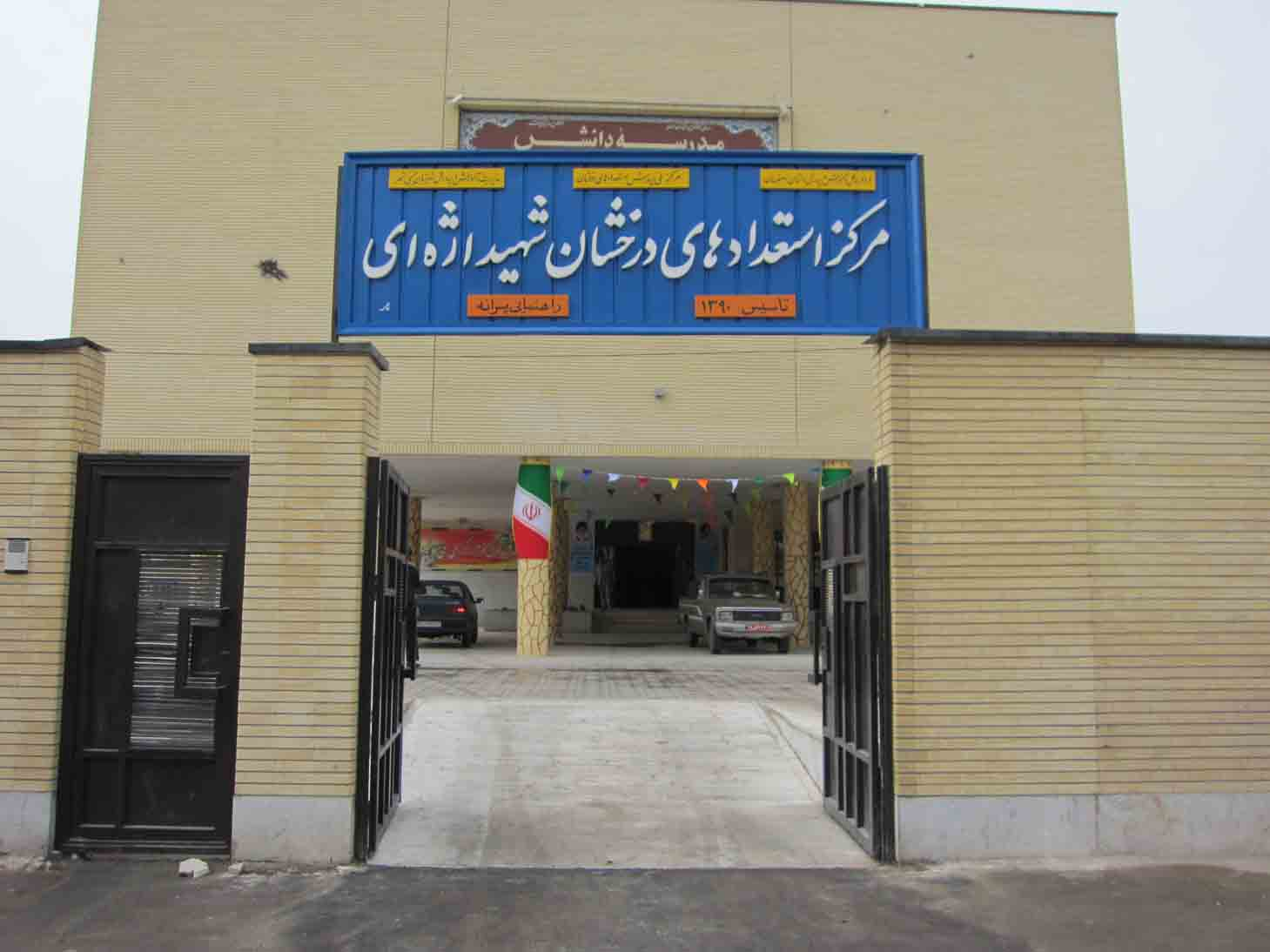 مدرسه شهید اژه ای خمینی شهر